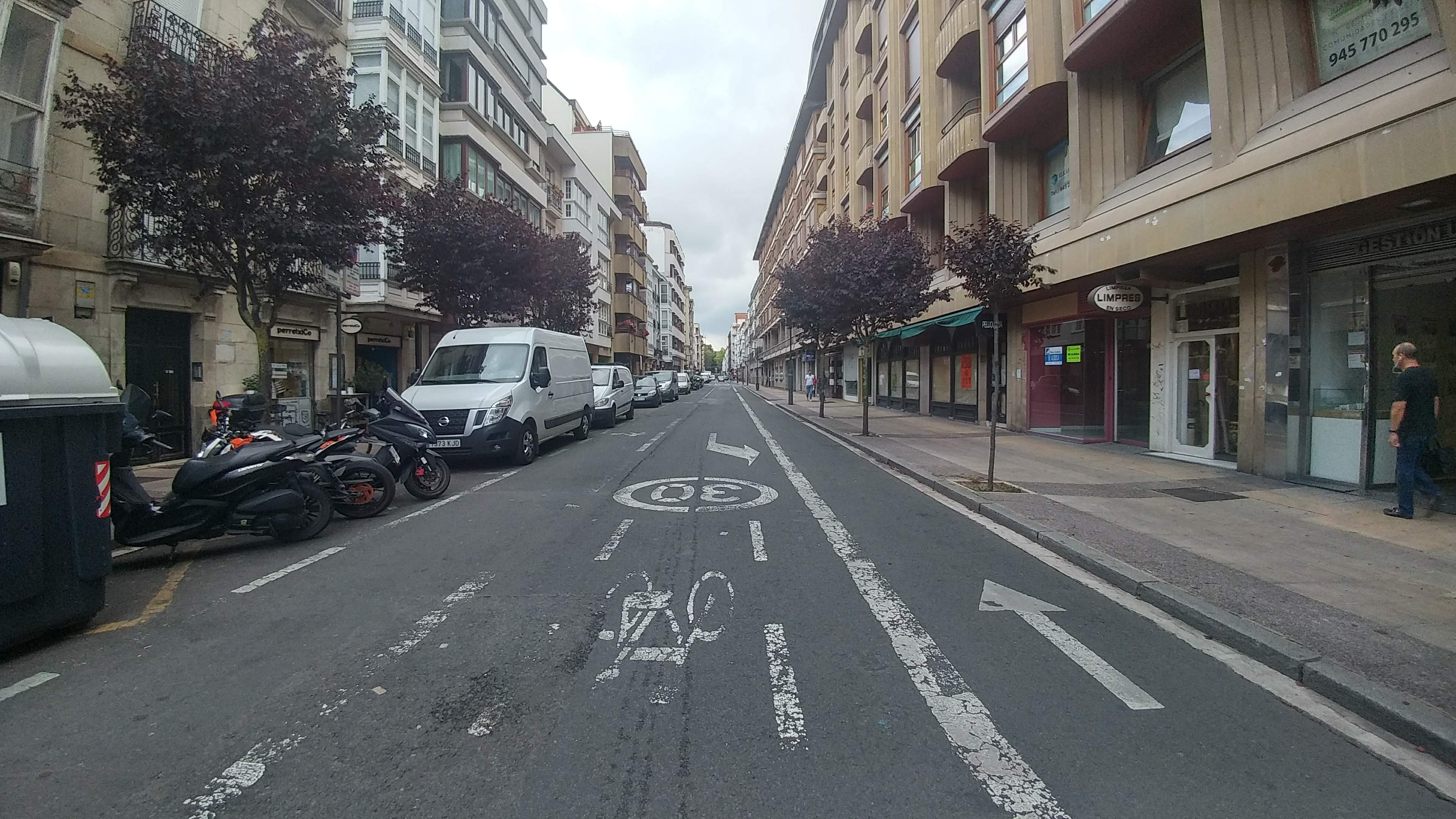 Gasteizko San Antonio kalea